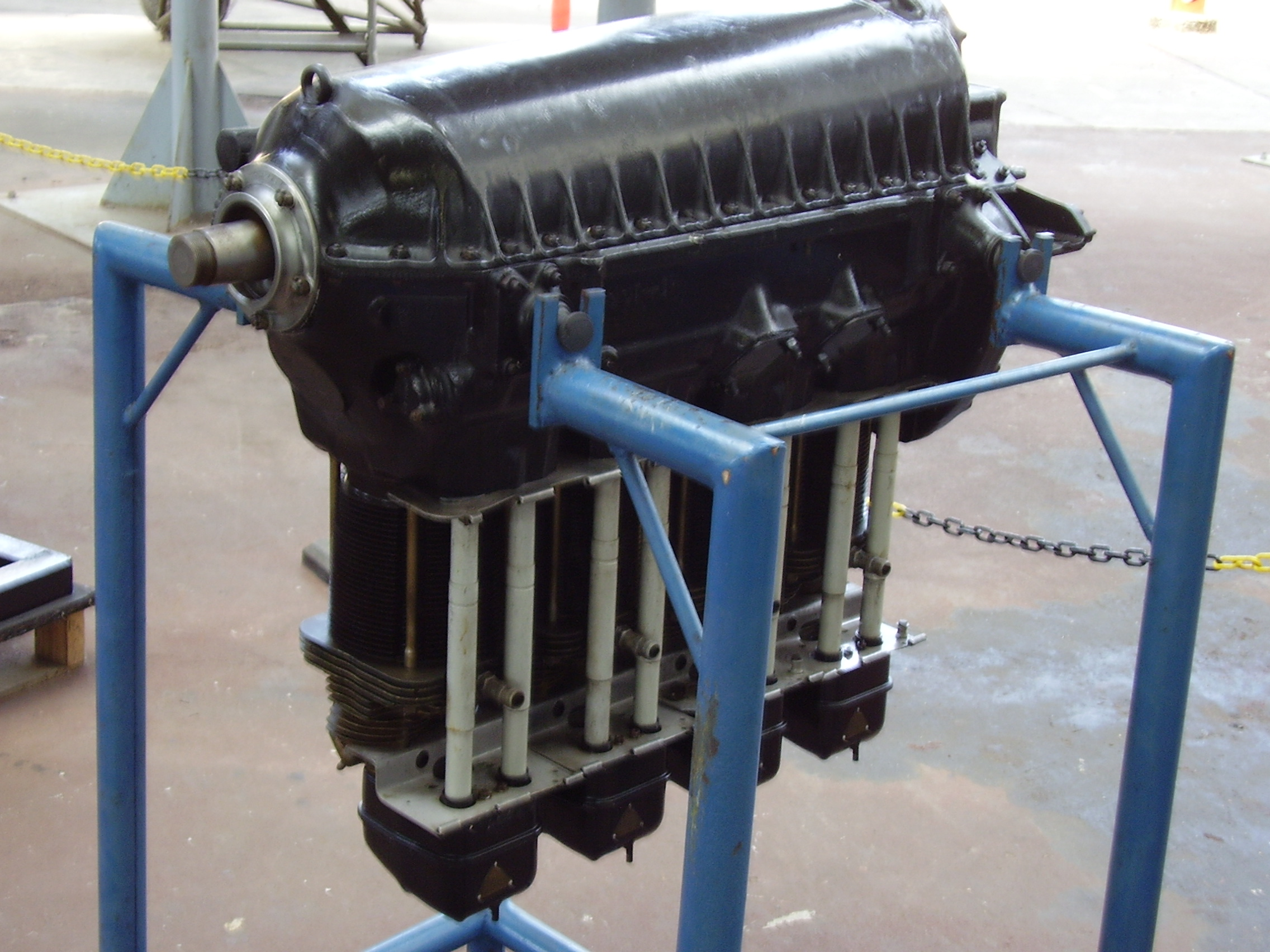 Royal Military Museum Brussels, Musée Royal de l'Armée, Koninklijk Museum van het Leger en de Krijgsgeschiedenis, a de Havilland Gipsy